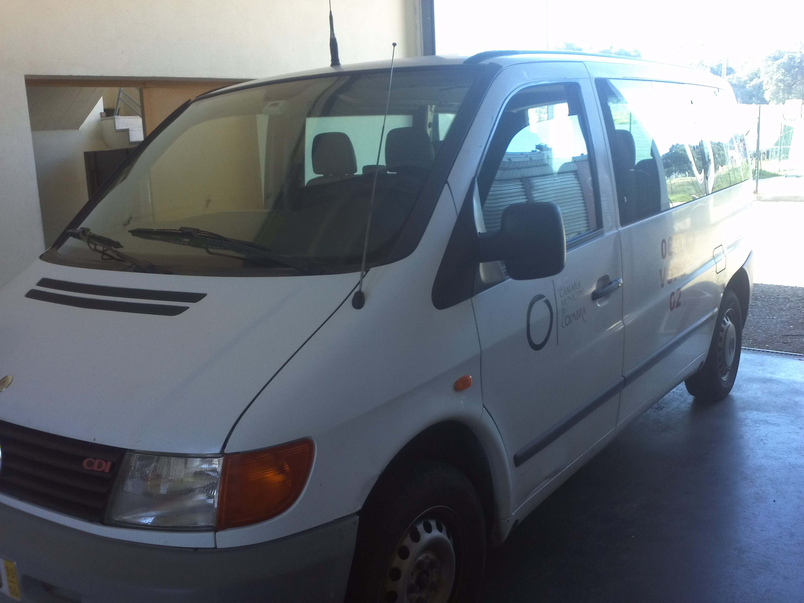 VOPE02